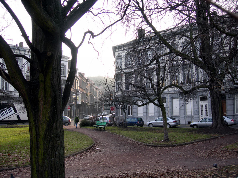 Photo personnelle (Claude Warzée, janvier 2006) de la place de Bronckart, Liège Guillemins (Belgique).